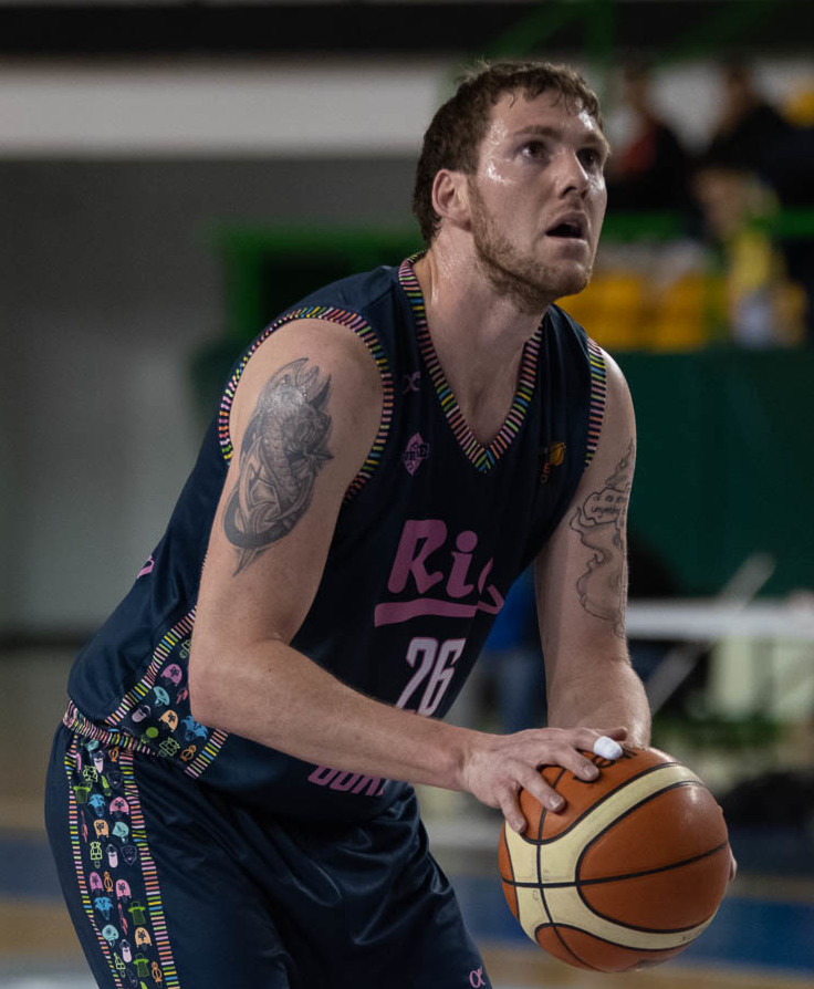 Kevin Van Wijk